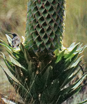 Nectarinia johnstonii Syn. Nectarinia johnstoni (bird) on Lobelia deckenii (plant)